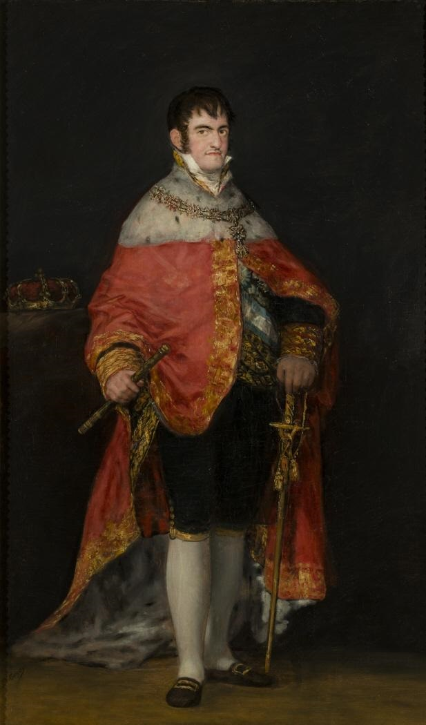 Retrato del rey Fernando VII de España (1784-1833). Es una obra con fines propagandísticos y oficiales, aunque algunos autores destacan que el monarca es mostrado con una «gran frialdad» e incluso «antipatía». Pero a pesar de ello esta obra es considerada uno de los mejores retratos que Francisco de Goya pintó del monarca cuando este regresó a España al término de la Guerra de la Independencia. Y esta obra, junto con el Retrato del Duque de San Carlos, que también se conserva en el Museo de Zaragoza, le fue encargada a Goya en septiembre de 1814 por la Junta del Canal Imperial de Aragón a propuesta de Martín de Garay, que poco antes había sido designado protector del mencionado Canal.